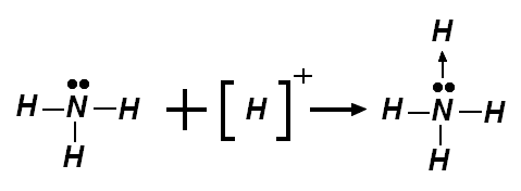 Adductvorming van ammonium